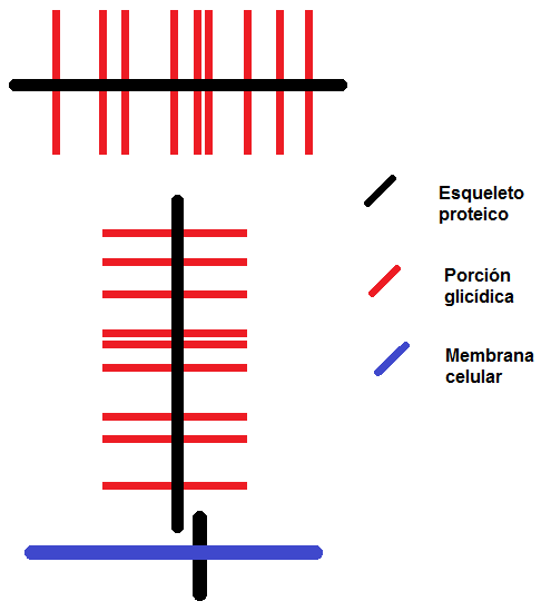 Diferentes tipos de mucinas